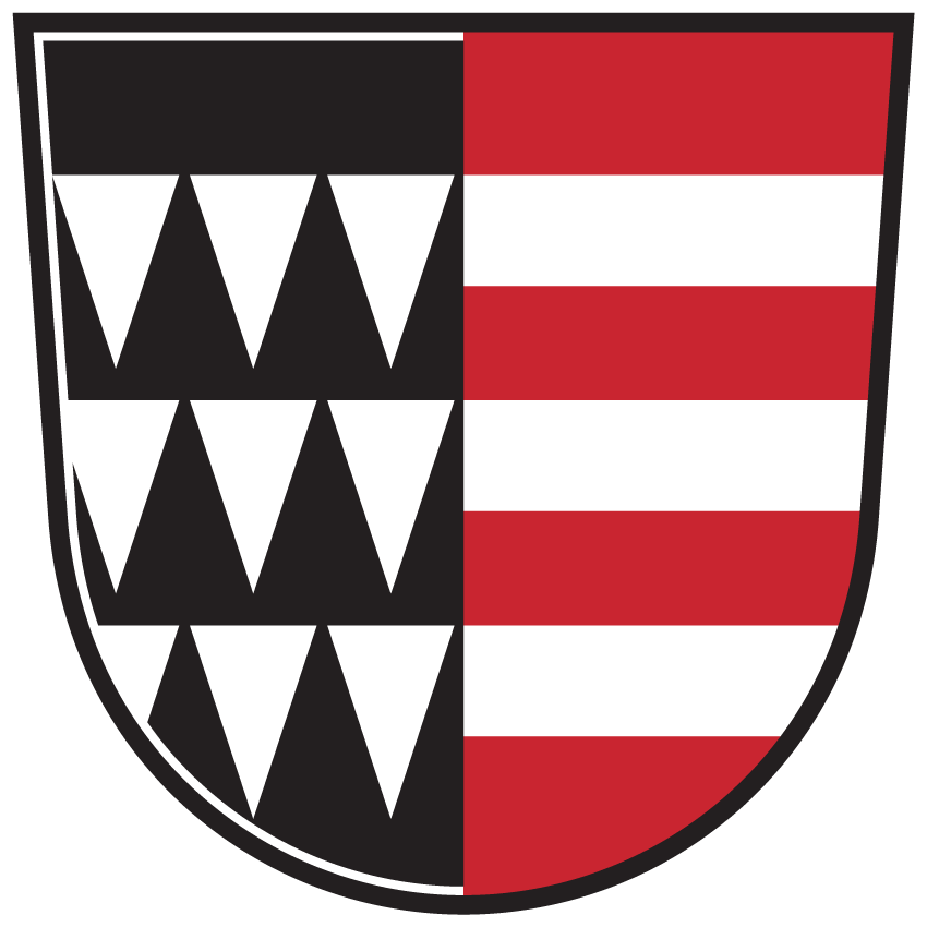 Wappen von St. Paul im Lavantal